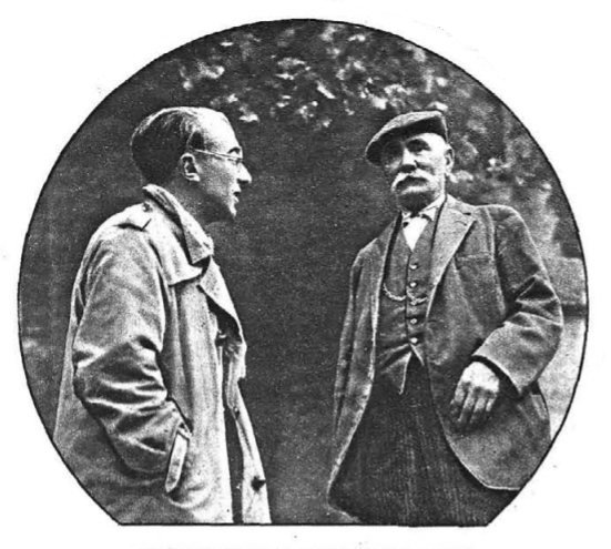 El general José Manuel Gómez Solana y Eduardo de Ontañón